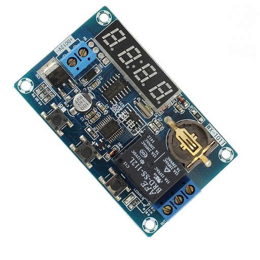 امروزه در اصطلاح ماژول برای قطعاتی مشابه تصویر بالا نیز به کار می رود